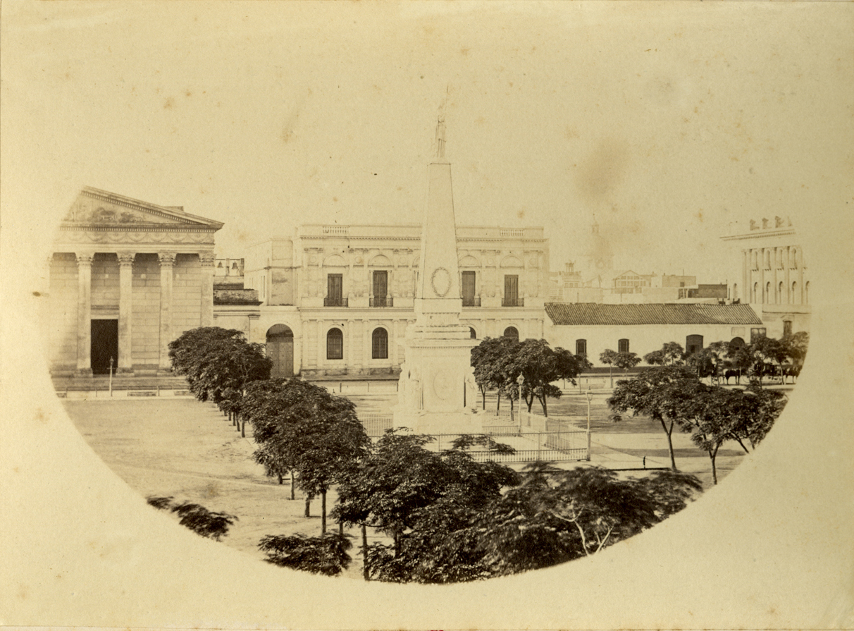 The Plaza de Mayo of Buenos Aires, with the Pyramid of May (secured by burglar bars) in the centre of the scene. On the left, the Cathedral; in the middle background, the Archidiocese building (destroyed by fire in 1955).